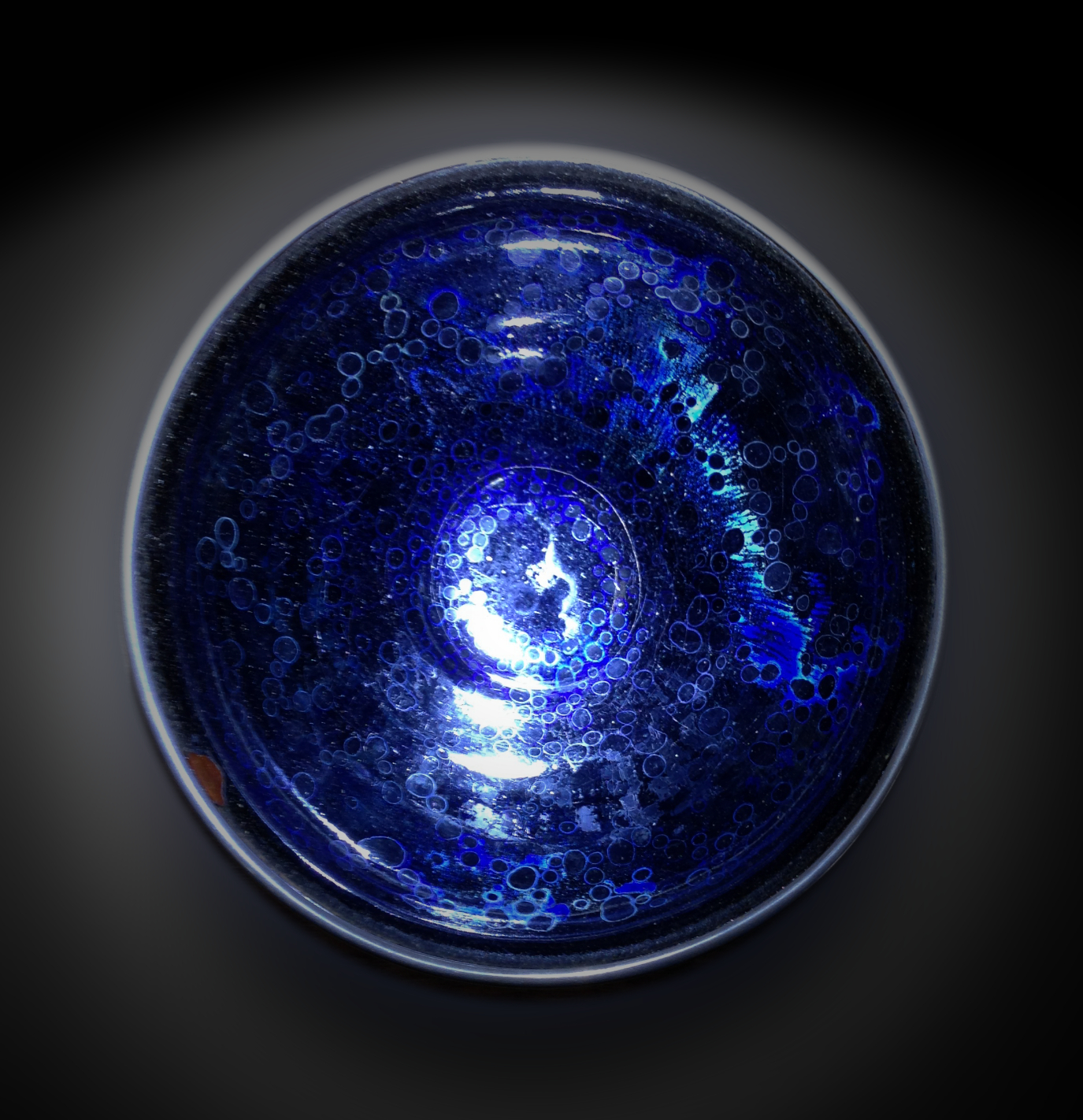 曜変天目茶碗